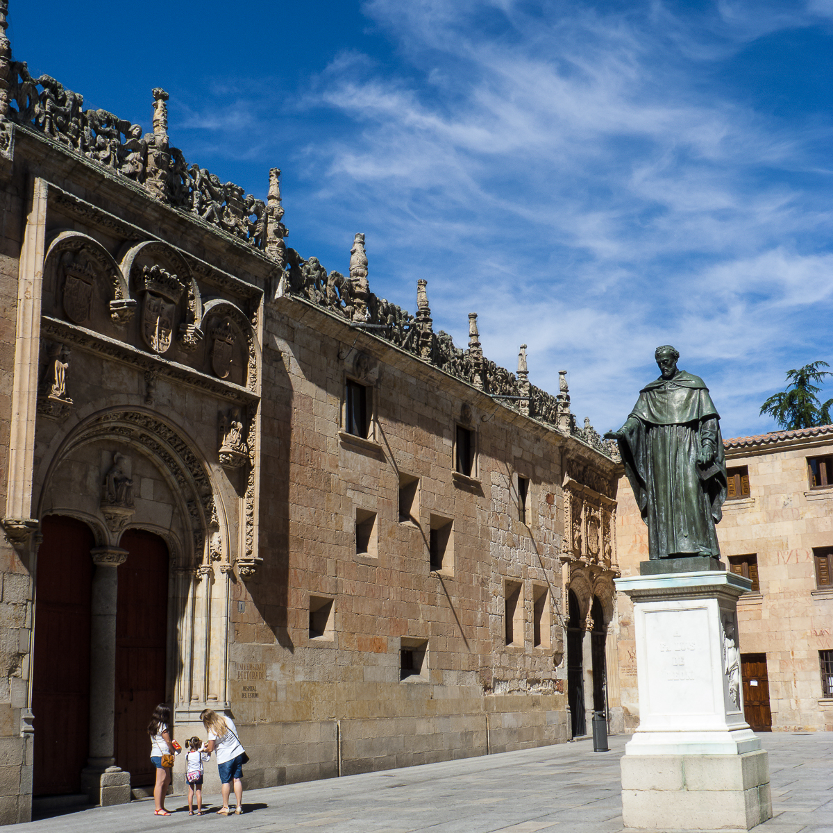 05082013 113057 SALAMANCA 1375